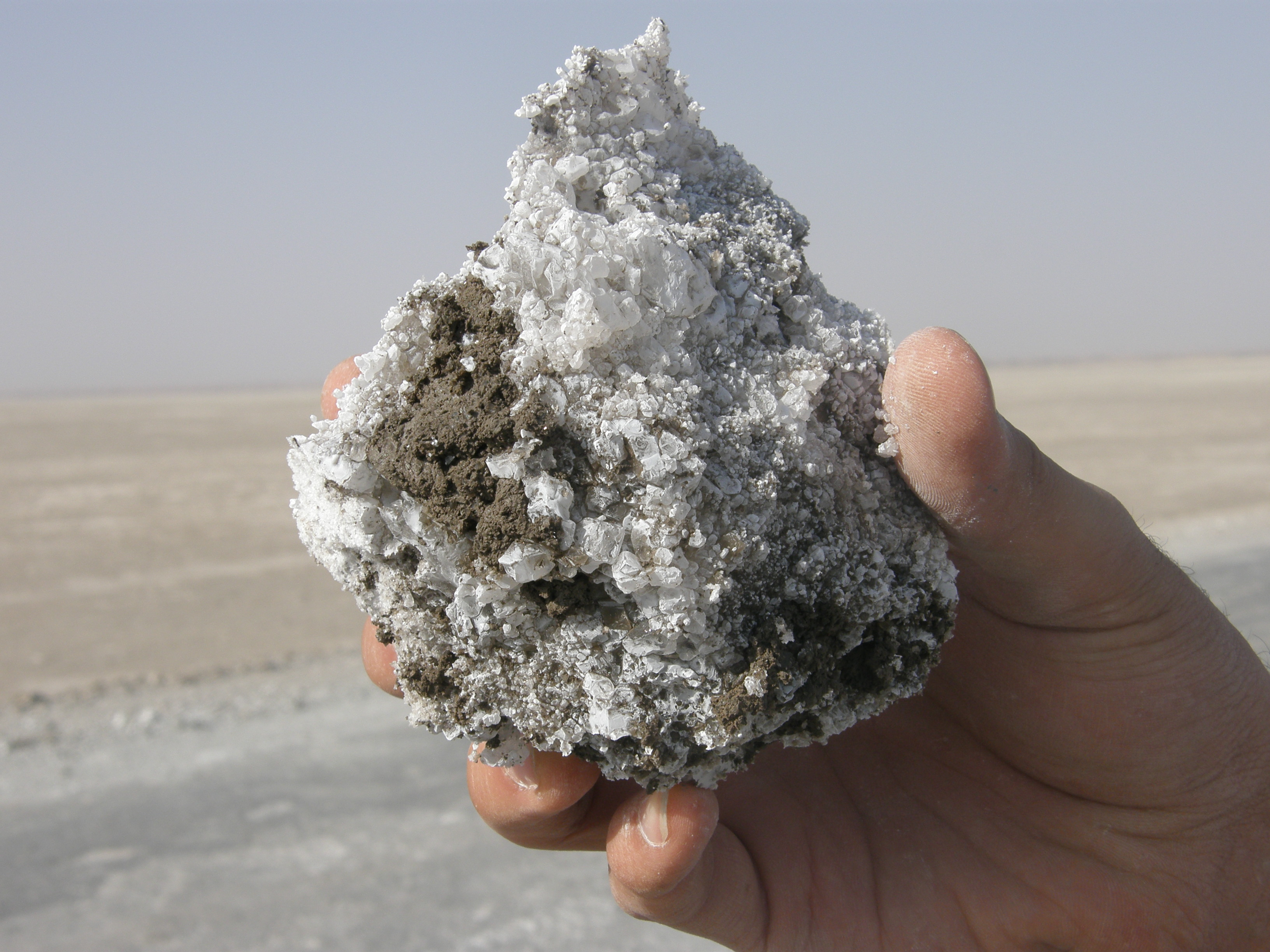 sodium sulfate extracted from this mineral